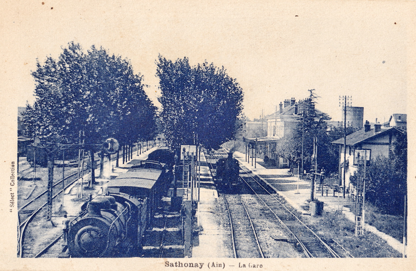 Carte postale ancienne éditée par Thiriat et Bazuyau :SATHONAY - La Gare